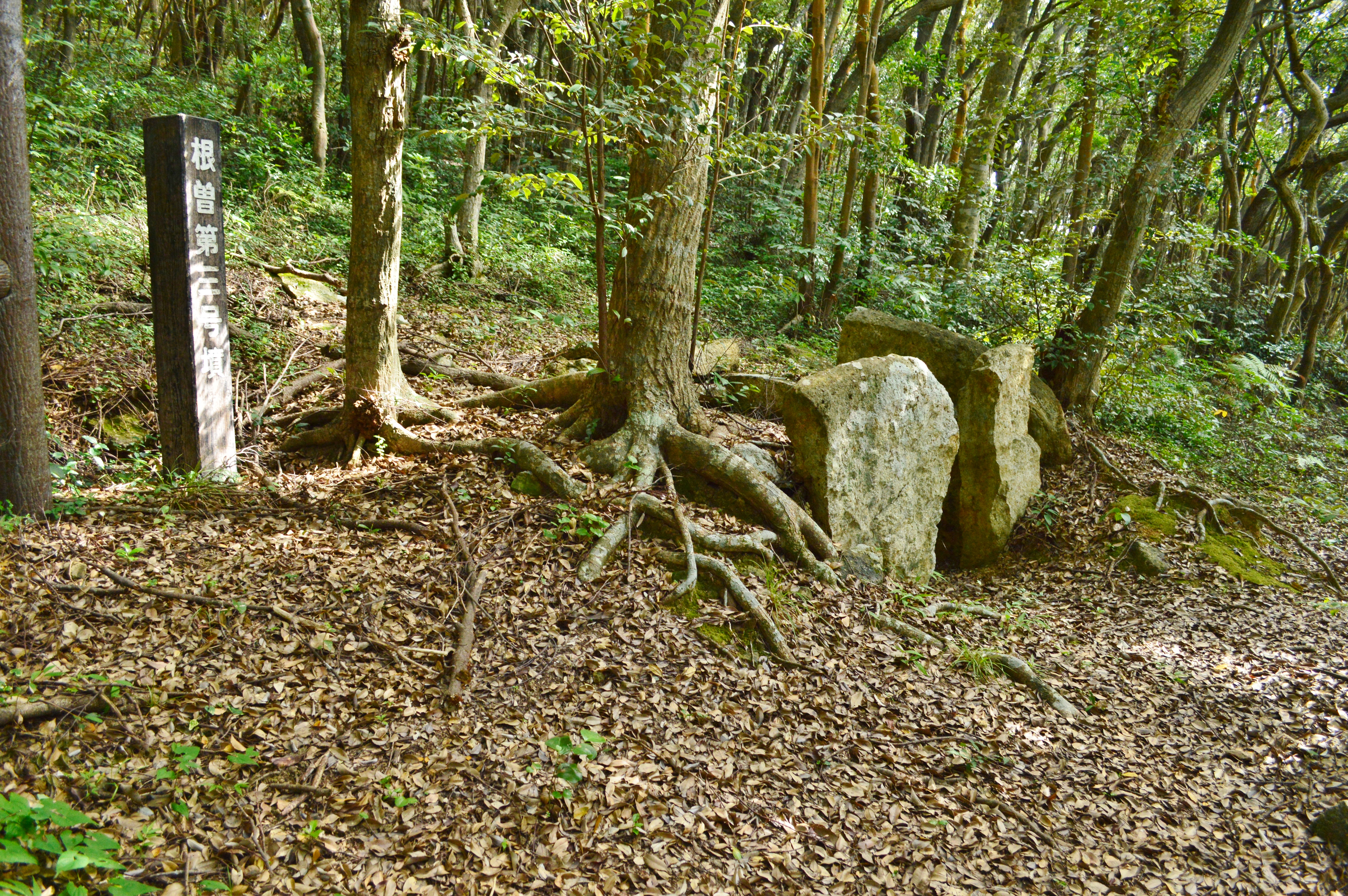 根曽第3号墳 石室